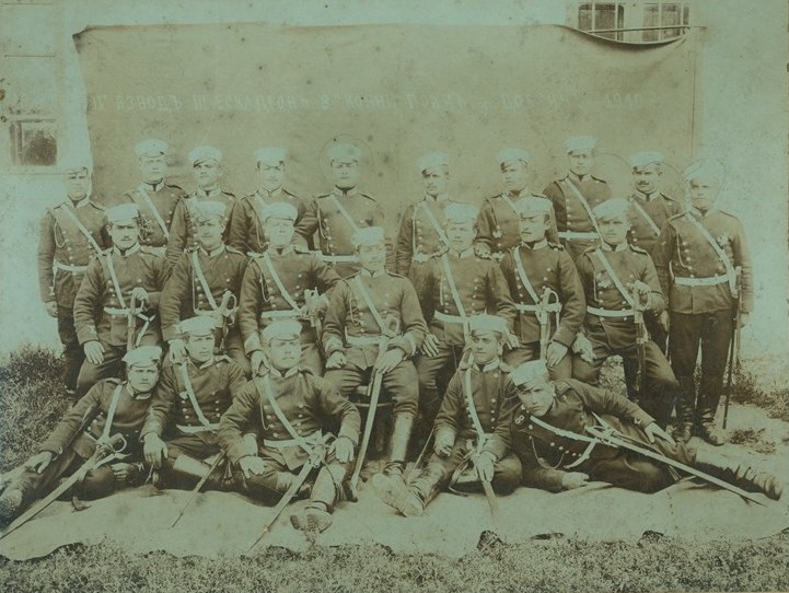 Войници от Осми конен полк, Четвърти взвод, Трети ескадрон, сред които е и Георги Петков Тодоров, участвал в Балканската, Междусъюзническата и Първата световна война.